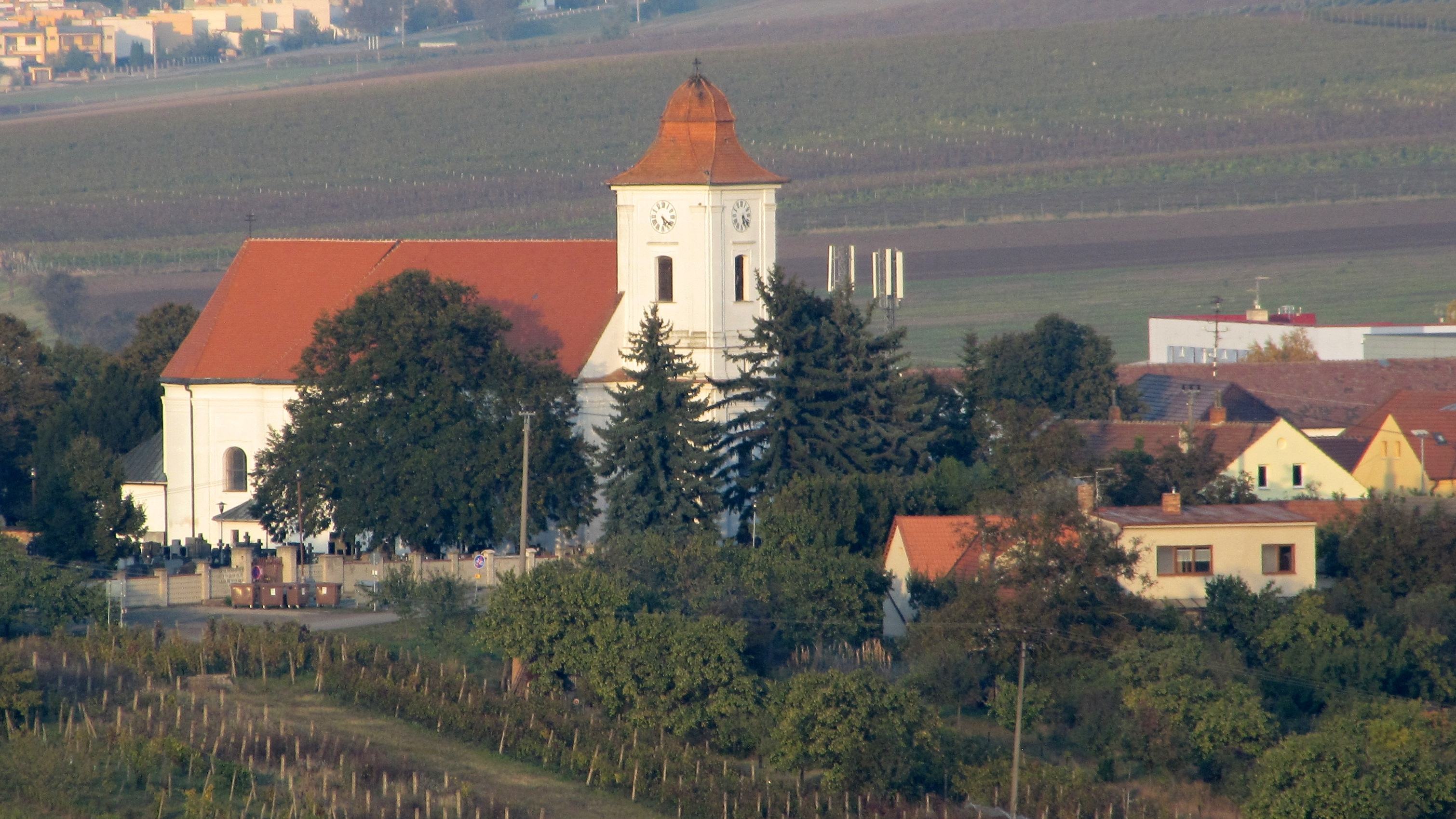 Kostel svaté Anny v Bořeticích